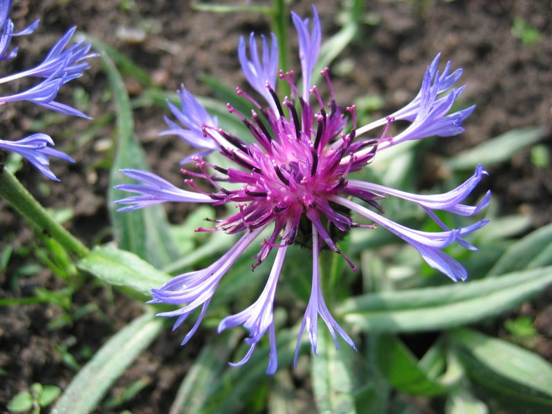 Filz-Flockenblume (Centaurea triumfettii)